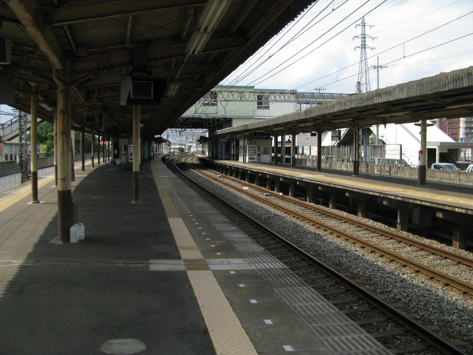 近鉄京都線向島駅